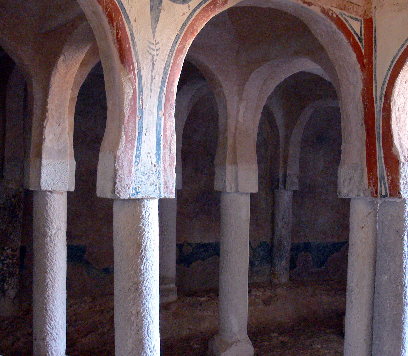 Ermita de San Baudelio en Casillas de Berlanga, Soria - España.